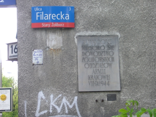 Dowództwo AK na Warszawskim Żoliborzu